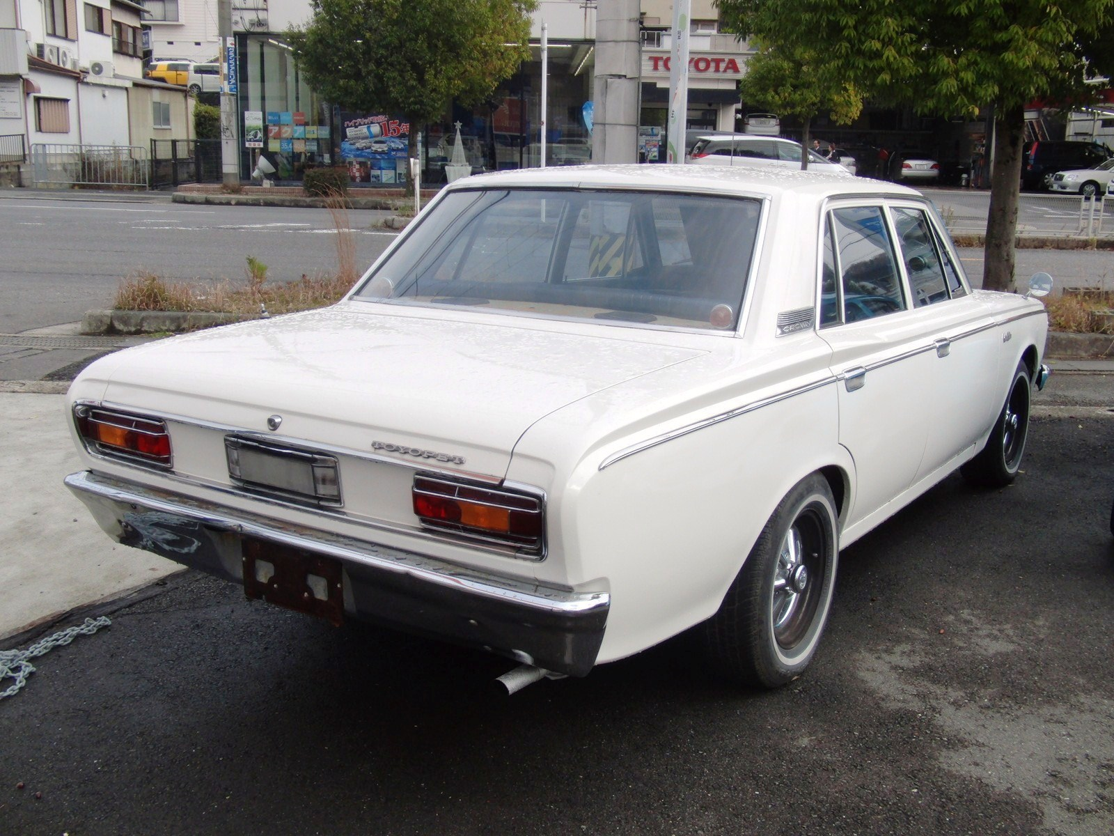 トヨペット・クラウン（S5#型）をリアから撮影